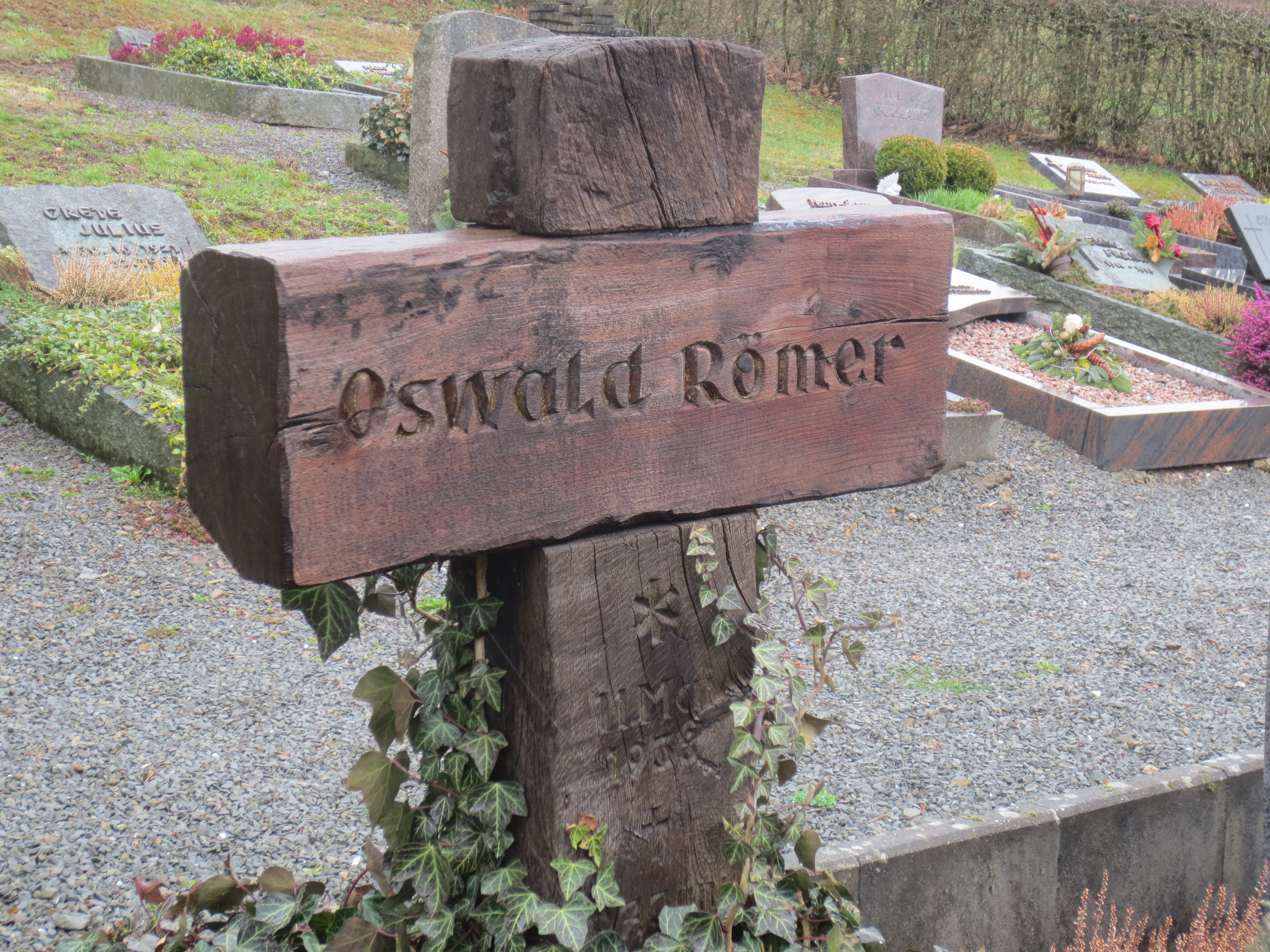 Holzkreuz am Grab des Malers Oswald Römer.